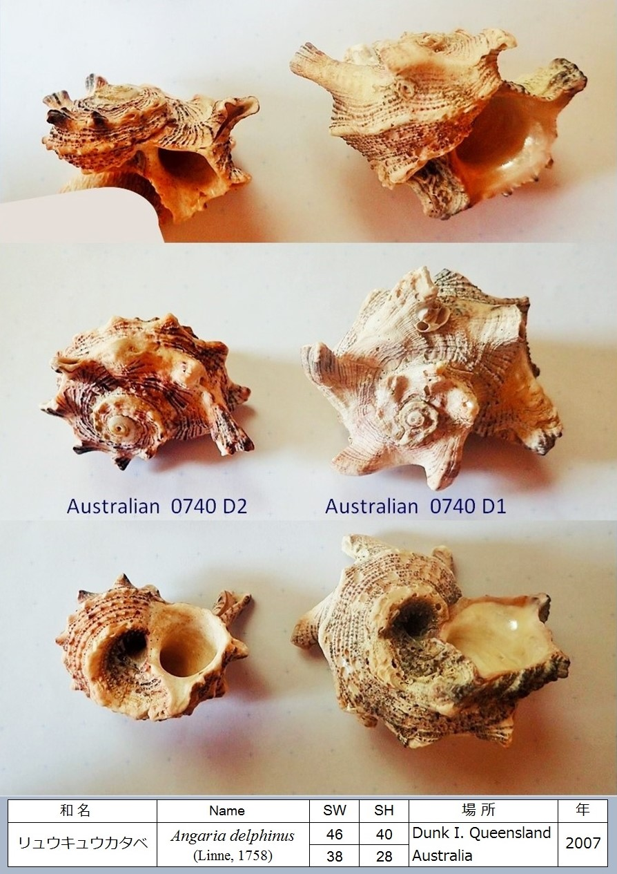 オーストラリア ダンク島産のリュウキュウカタベガイの貝殻